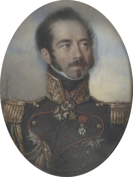 Général baron Gaspard Gourgaud